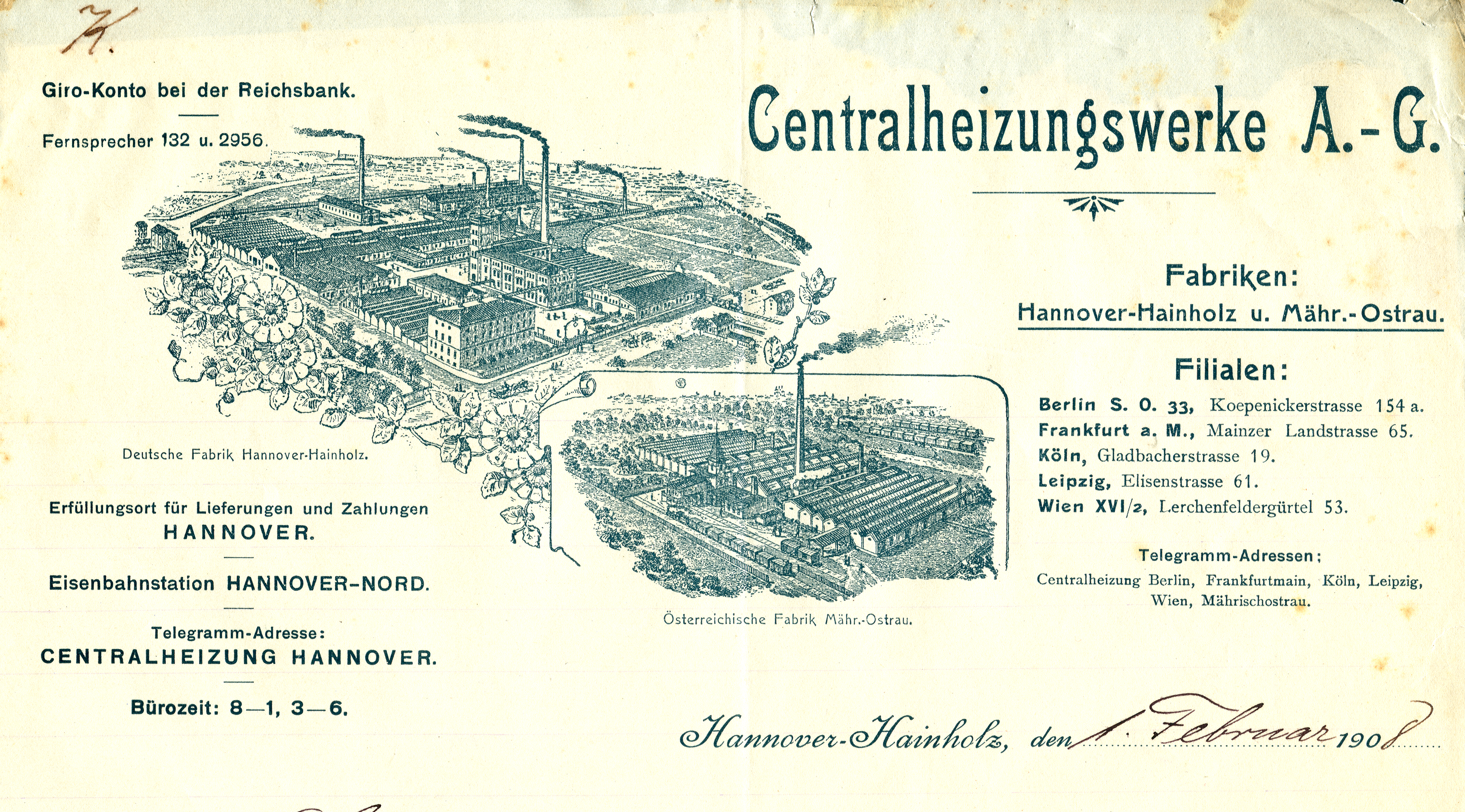 Um 1900 für das erste Jahrzehnt des 20.Jahrhunderts vorgedruckter Briefkopf (Scan mit 600 dpi, Ausschnitt) der Centralheizungswerke AG mit den - sicher idealisierten - Vogelschau-Stichen über die Fabriken in Hannover-Hainholz und der Fabrik in im seinerzeit österreichischen Stadt Mährisch-Ostrau (heute, Stand: 09/2014: Moravská Ostrava). Daneben findet sich unter anderem eine Liste der Filialen in Berlin, S.O. 33, Köpenicker Straße 154a, Frankfurt am Main, Mainzer Landstraße 65, Köln, Gladbacher Straße 19, Leipzig, Elisenstraße 61, Wien, XII/2, Lerchenfeldergürtel 53 sowie die dazugehörigen Telegramm-Adressen. Mit Stand vom September 2014 konnte anhand der Stiche noch kein etwaiger Rest der abgebildeten Gebäude oder der umfangreichen Eisenbahn-Anlagen eindeutig und georeferenziert zugeordnet werden ...